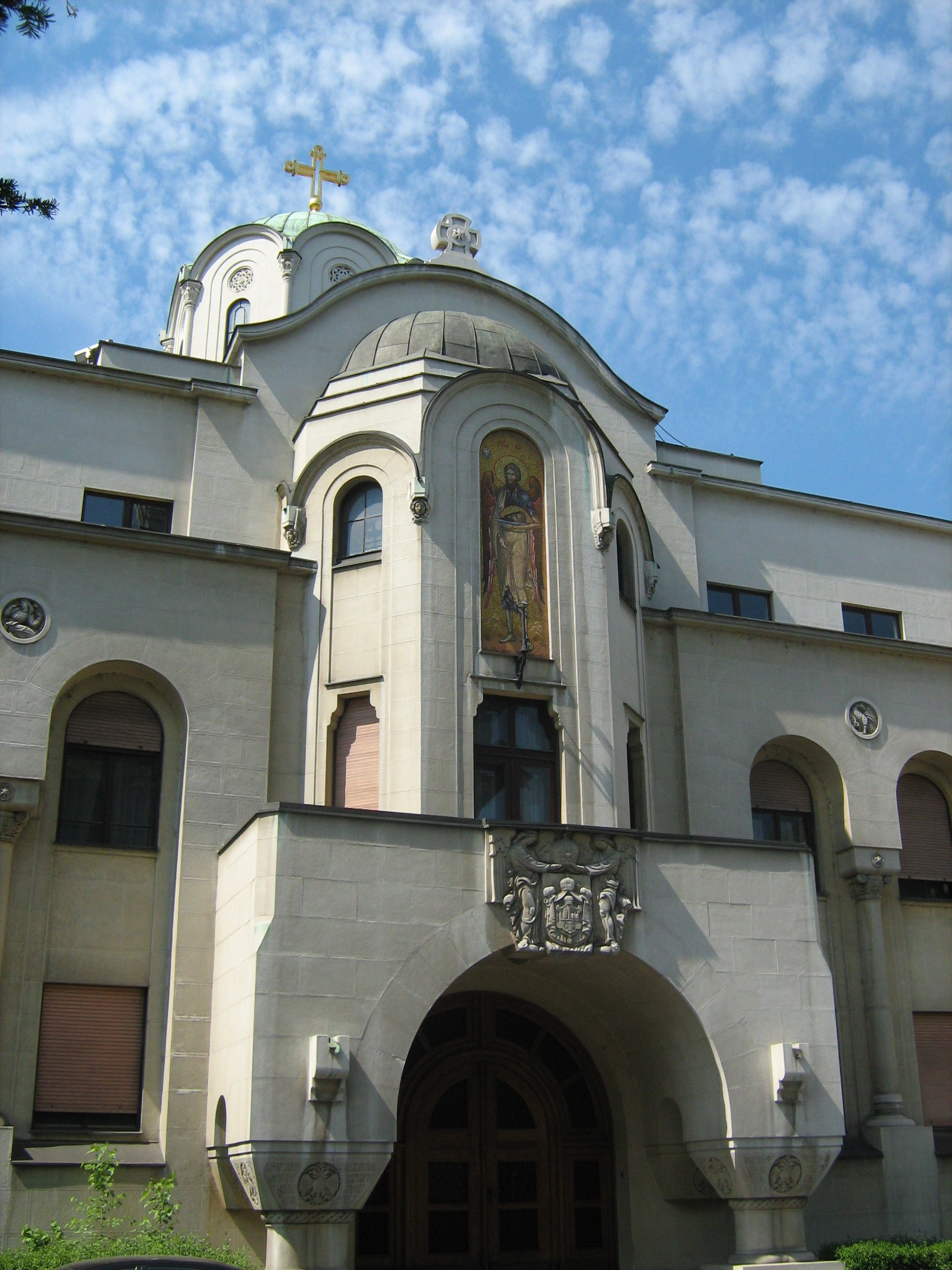 Зграда патријаршије у Београду